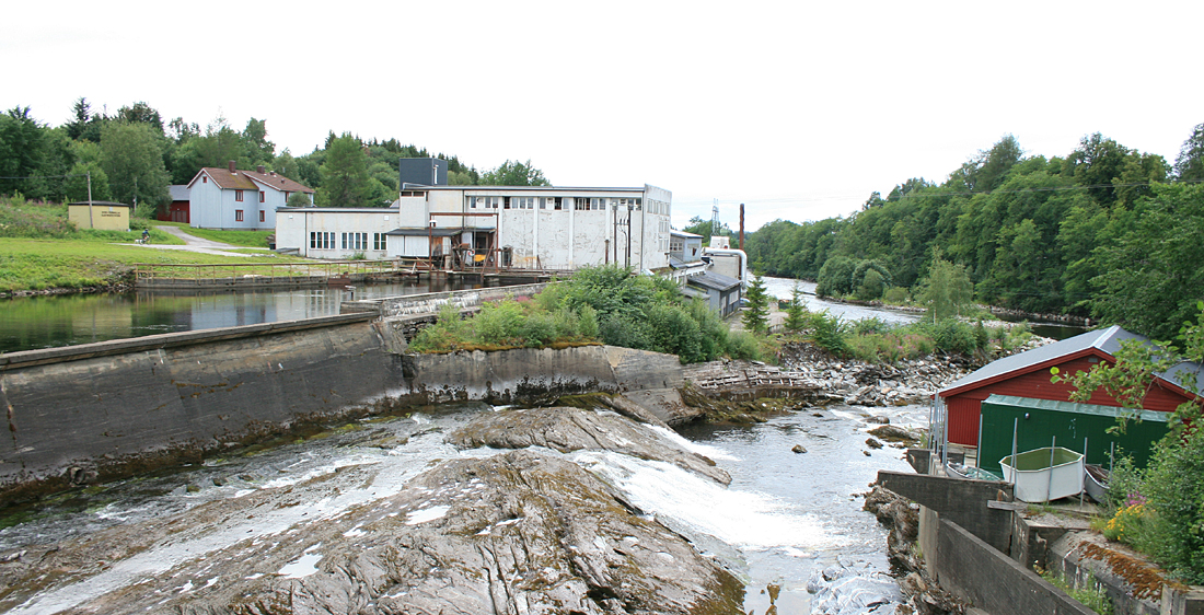 Byafossen, Steinkjer, Norway.